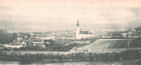 Königstetten